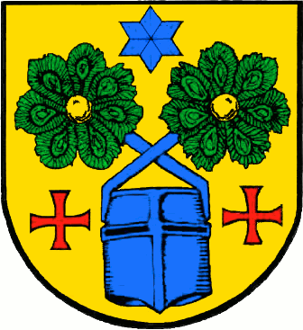 Wappen der Stadt Teterow